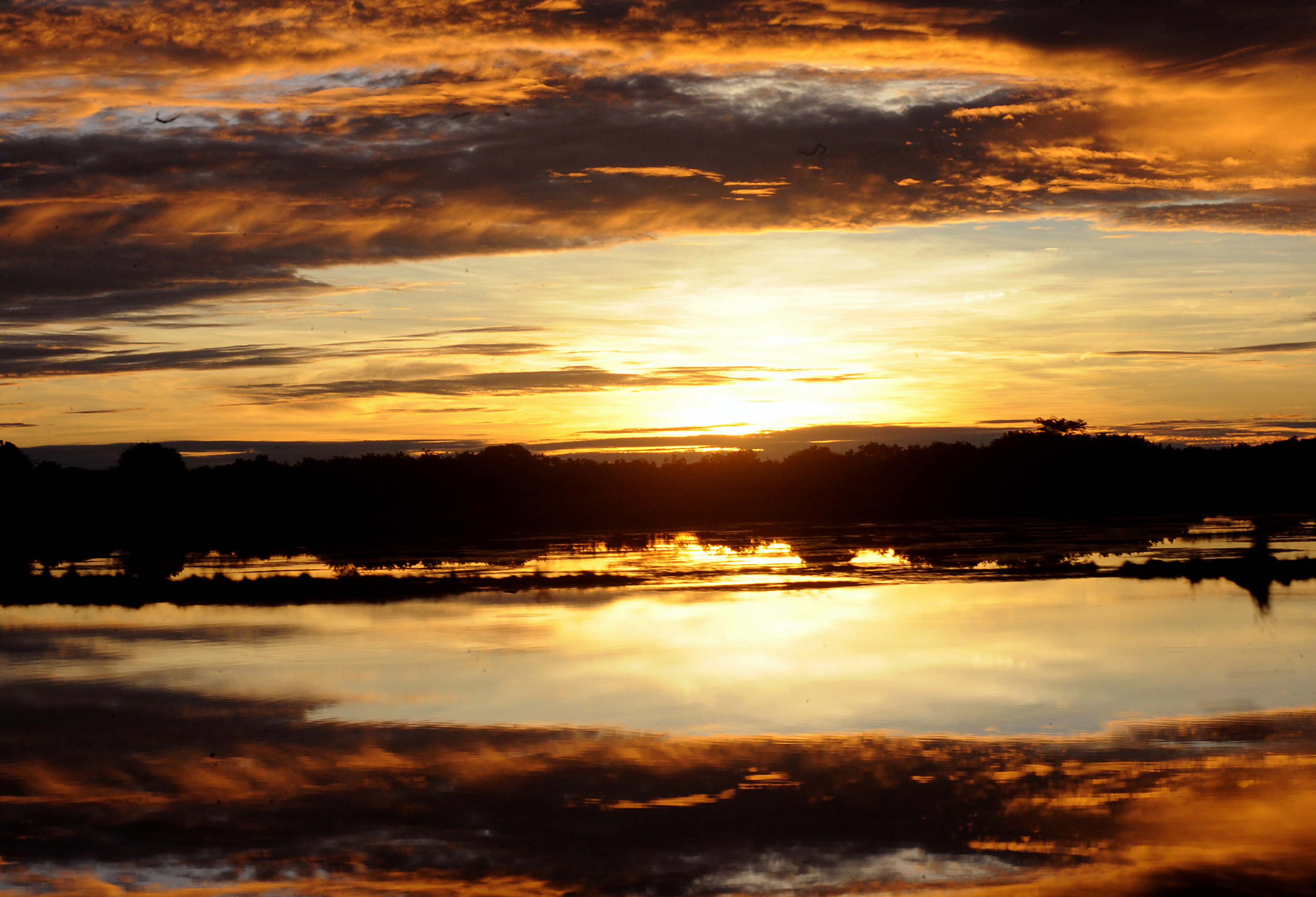 Raposa Serra do Sol (Roraima) - Nascer do sol na aldeia onde está tudo pronto para receber o presidente Luiz Inácio Lula da Silva para as comemorações do Dia do Índio.